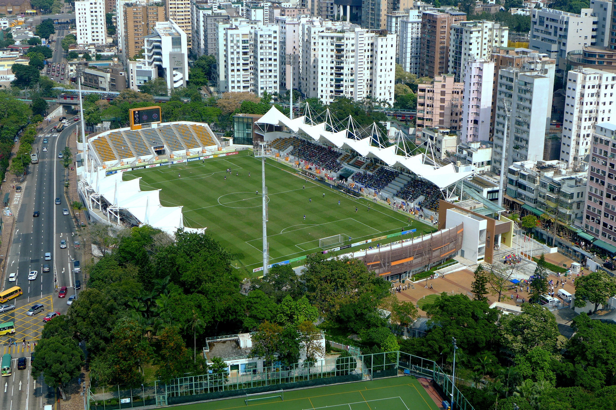 Mong Kok Stadium_